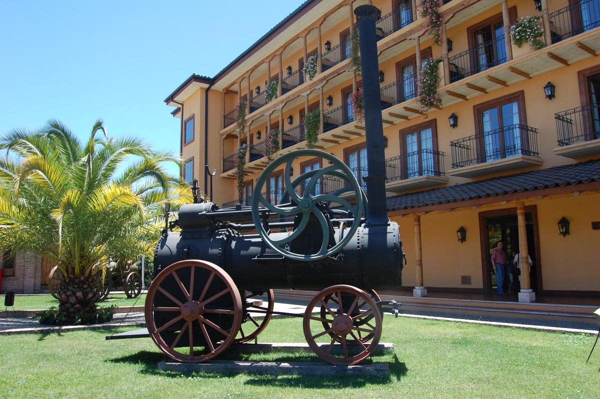 Patio interior del Museo de Colchagua en Santa Cruz.